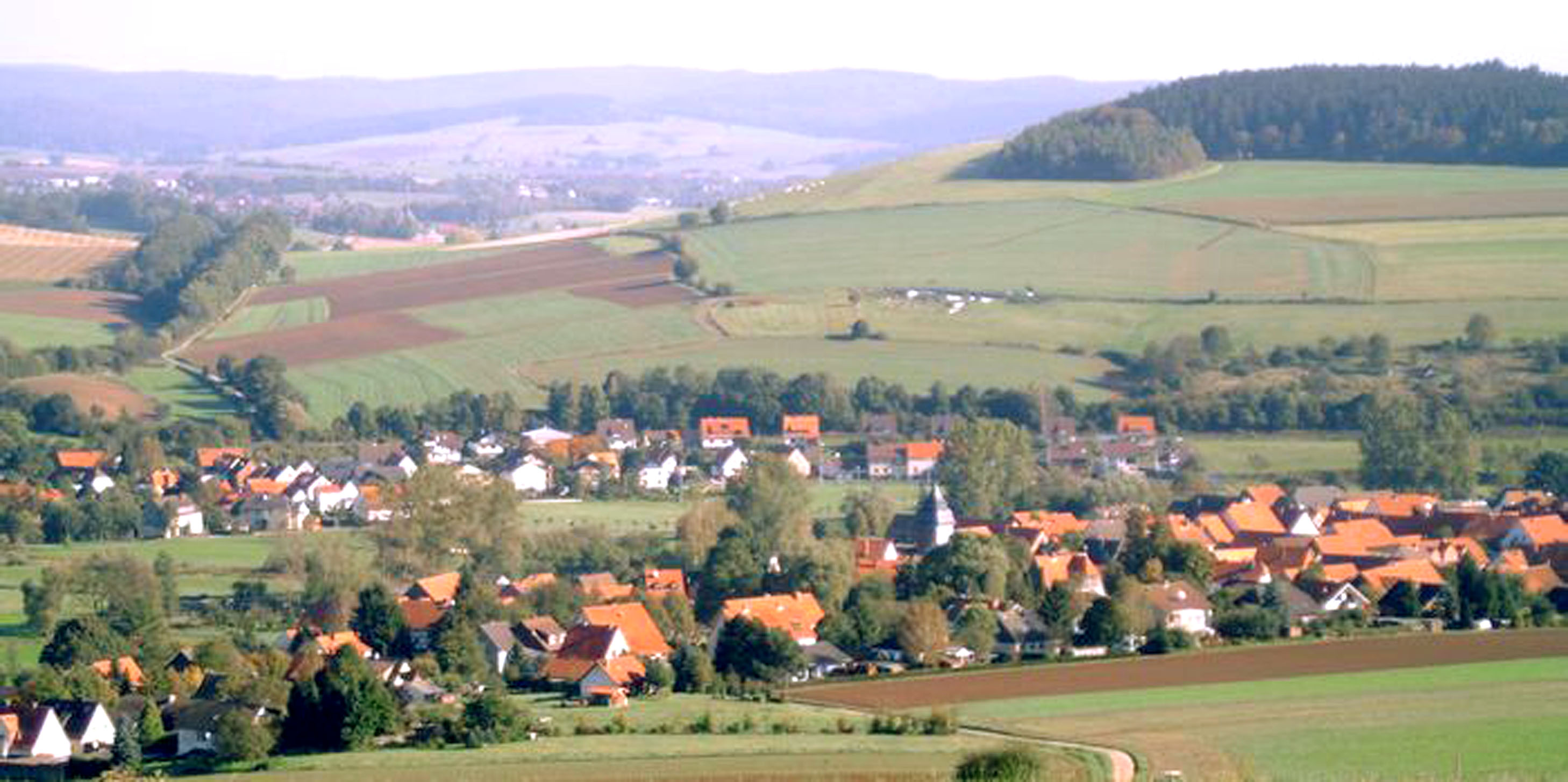 Vernawahlshausen.